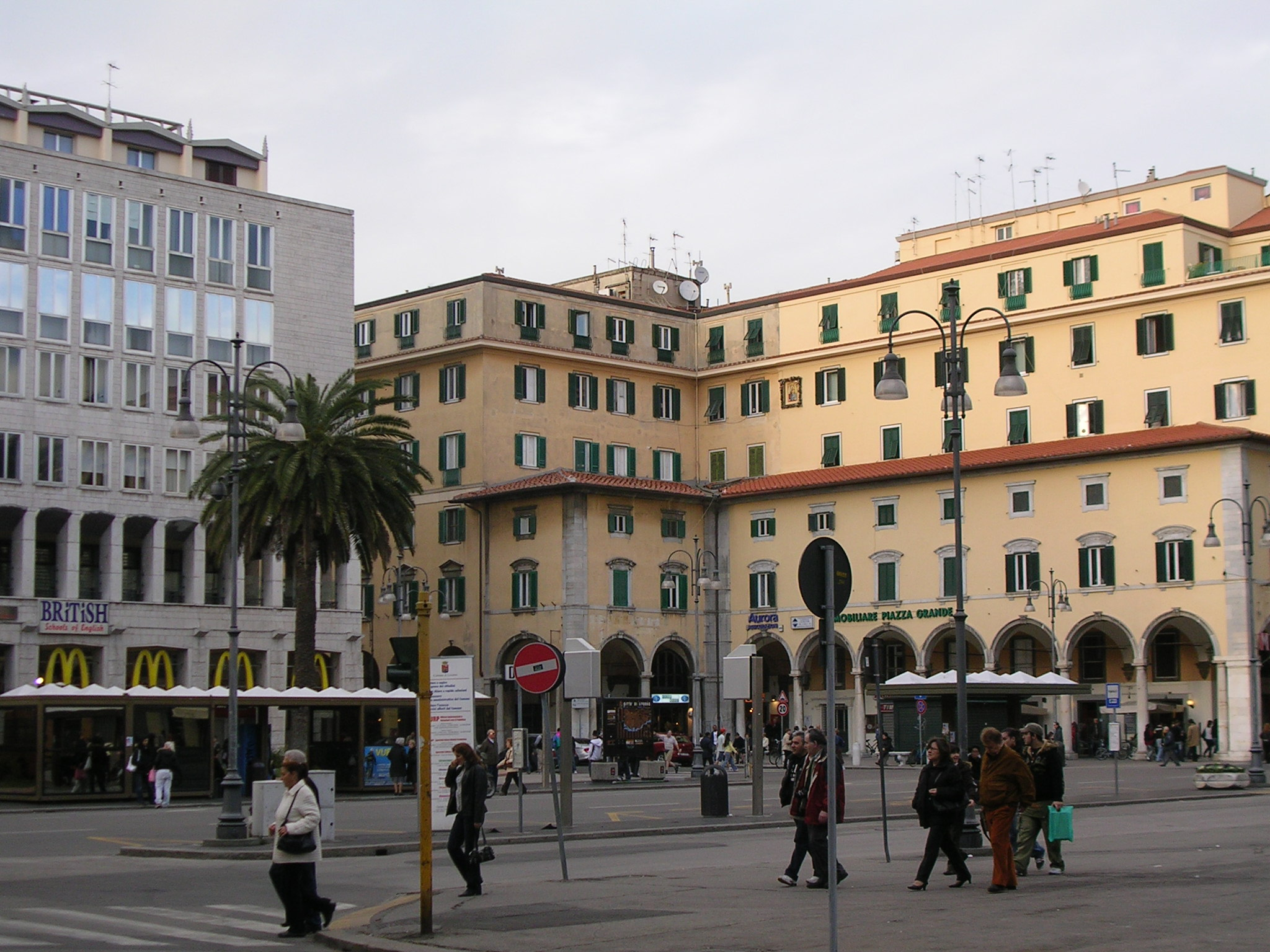 Livorno: Piazza Grande oggi con gli antichi portici progettati da Alessandro Pieroni.